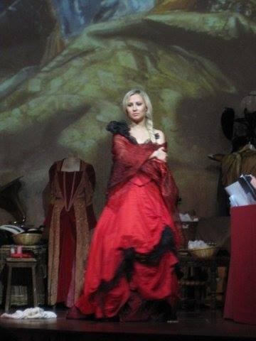 Teatro San Gallo a Venezia